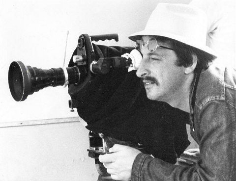 Una foto d'epoca di Bazzini con la macchina da presa